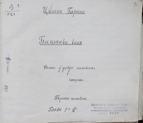 Ц. Гартны. Раман “Бацькава воля”. Ч. 1. Аўтограф. 1921 г.